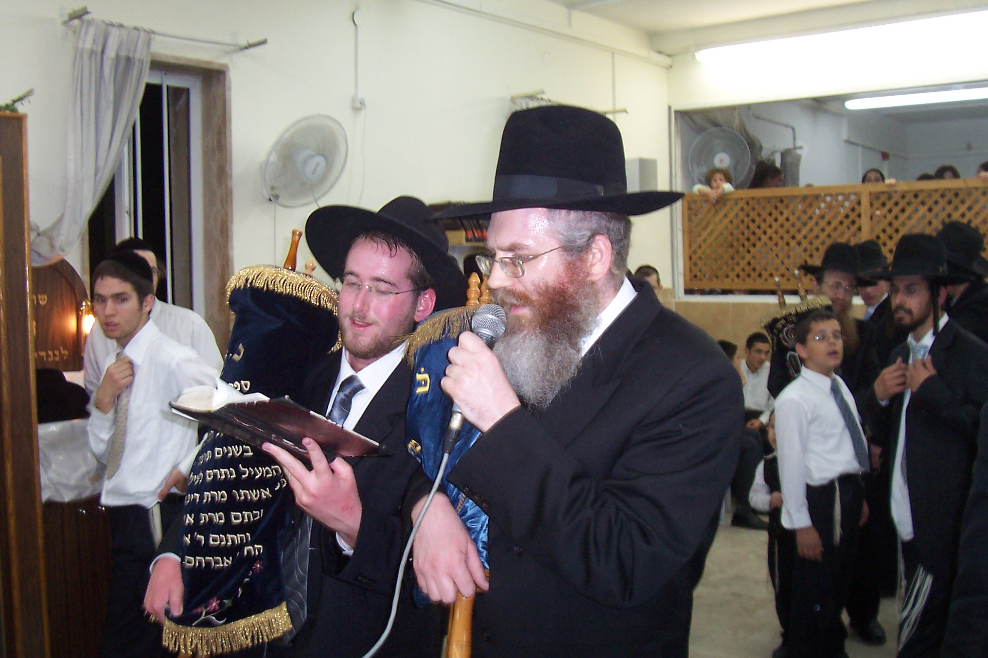 הרב דניאל וולפסון